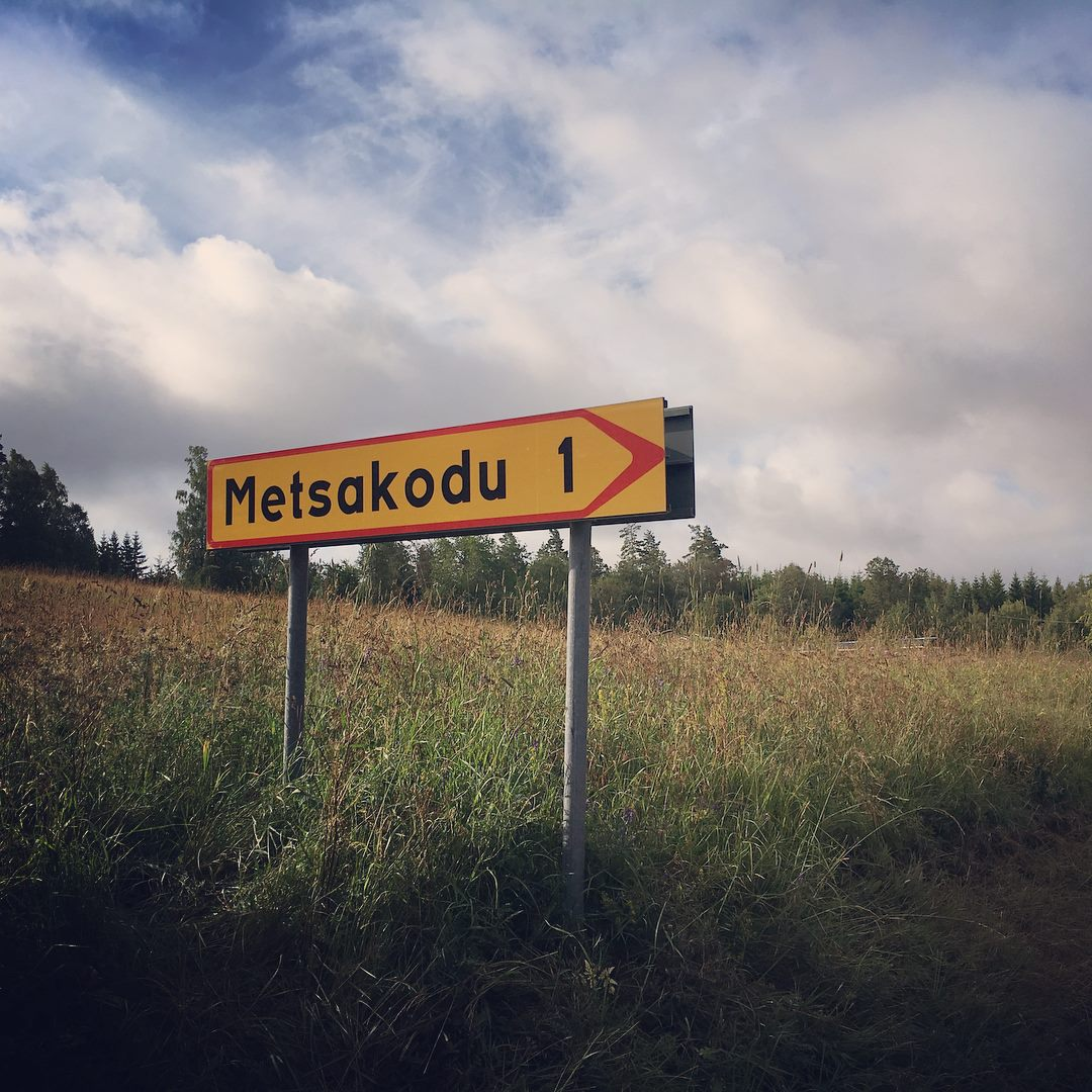 Teeviit Metsakodu tee ääres